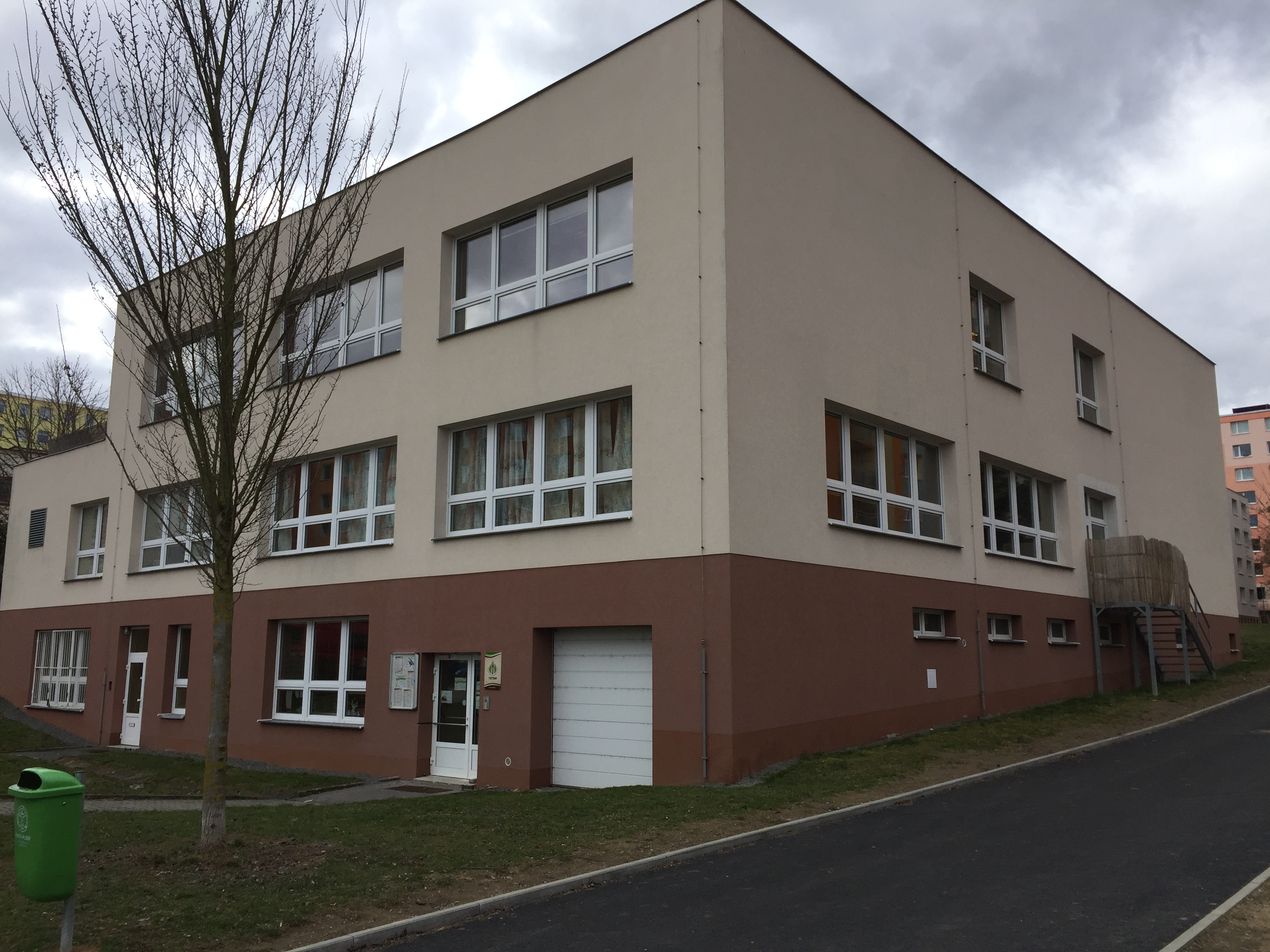 Hlavní budova Totemu v Plzni Bolevci s vlastními prostorami pro aktivity a sídlem vedení Totemu.